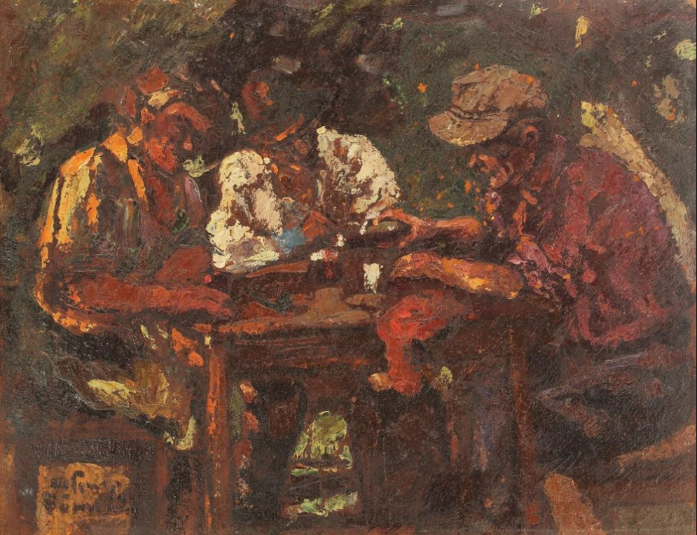 Băutorii de vin, ulei pe pânză, 40 × 51 cm, semnat stânga jos, cu brun, Octav Băncilă